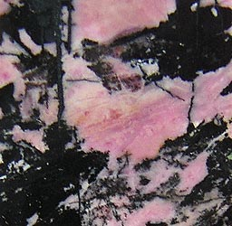 Родонит-орлец, Средний Урал.